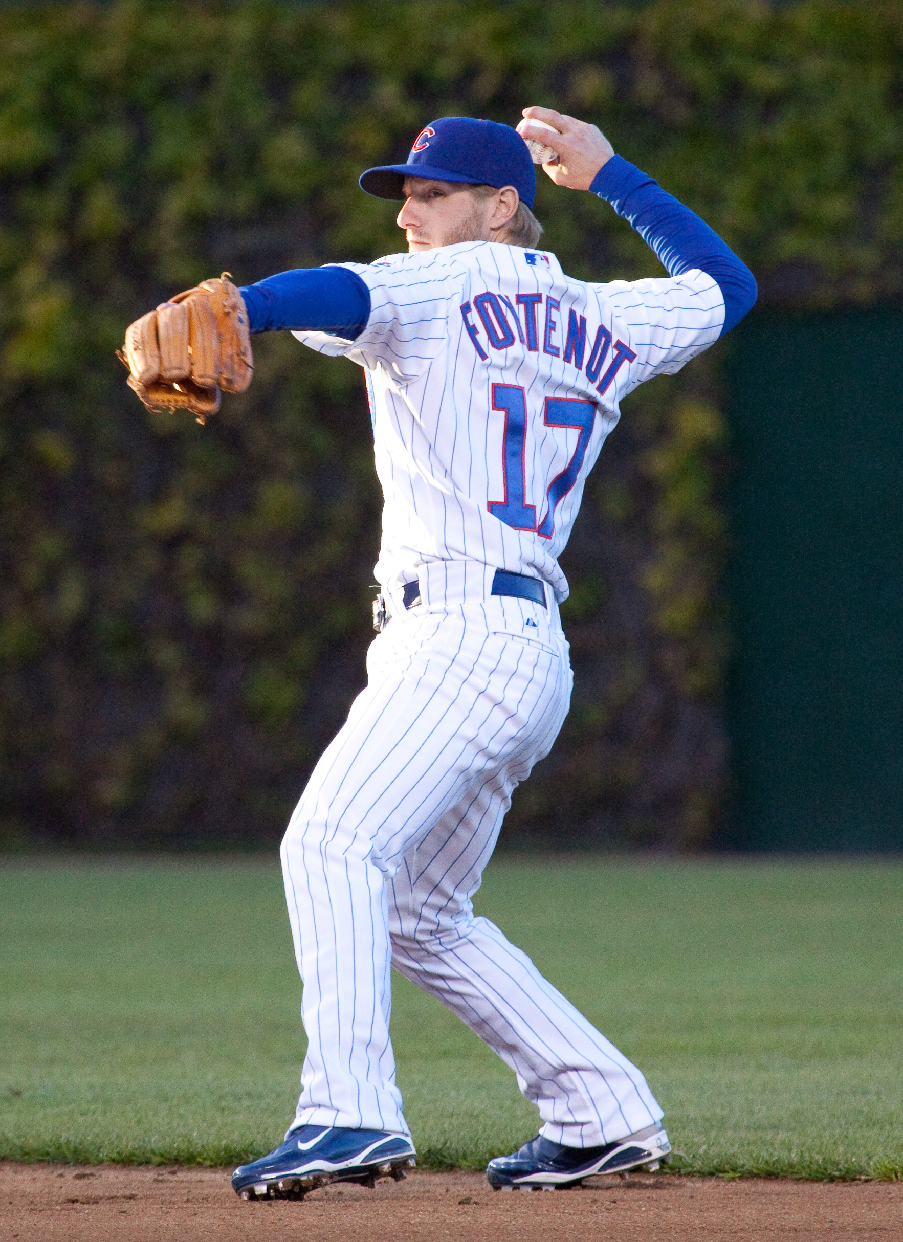 Mike Fontenot